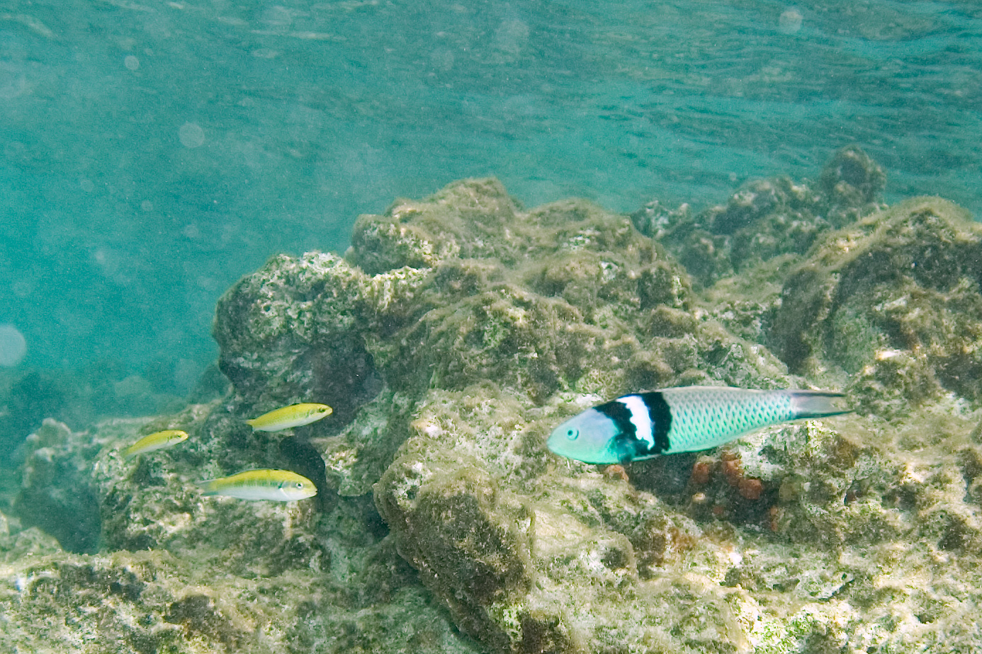 terminal and juvenile/initial phases